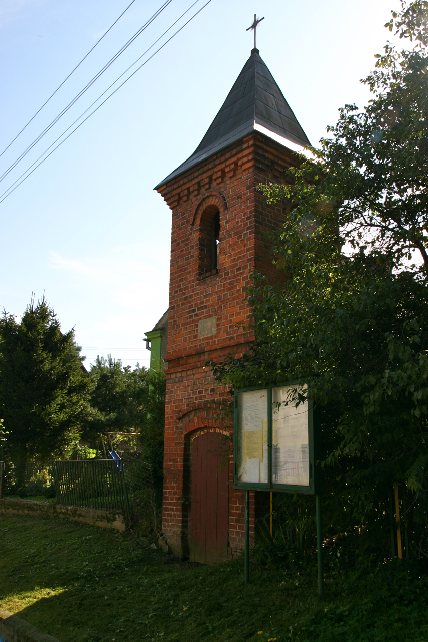 Laskowice – wieś w Polsce położona w województwie opolskim, w powiecie prudnickim, w gminie Lubrza.